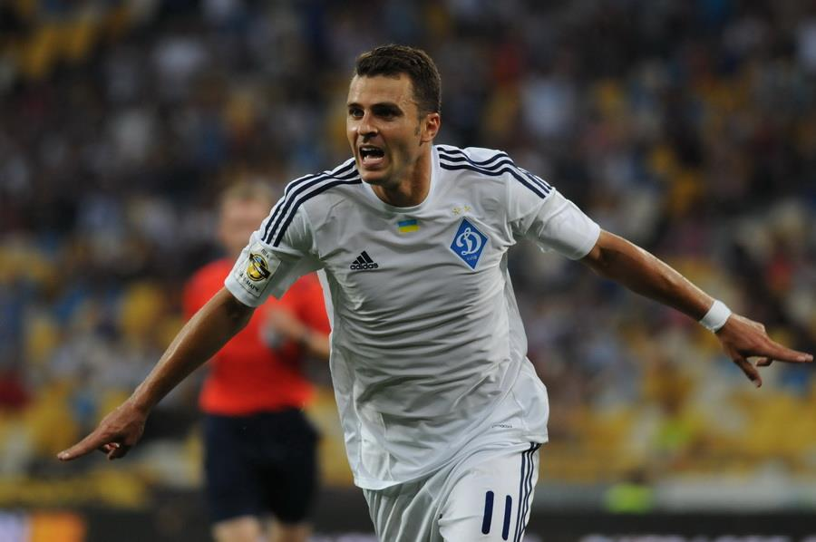 Жуніор Мораєс святкує перший забитий гол за Динамо (Київ)